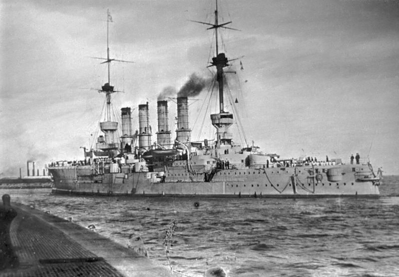 Großer Kreuzer der Roon-Klasse" Großer Kreuzer / Panzerkreuzer der Roon-Klasse ("S.M.S. Yorck" oder "S.M.S. Roon")